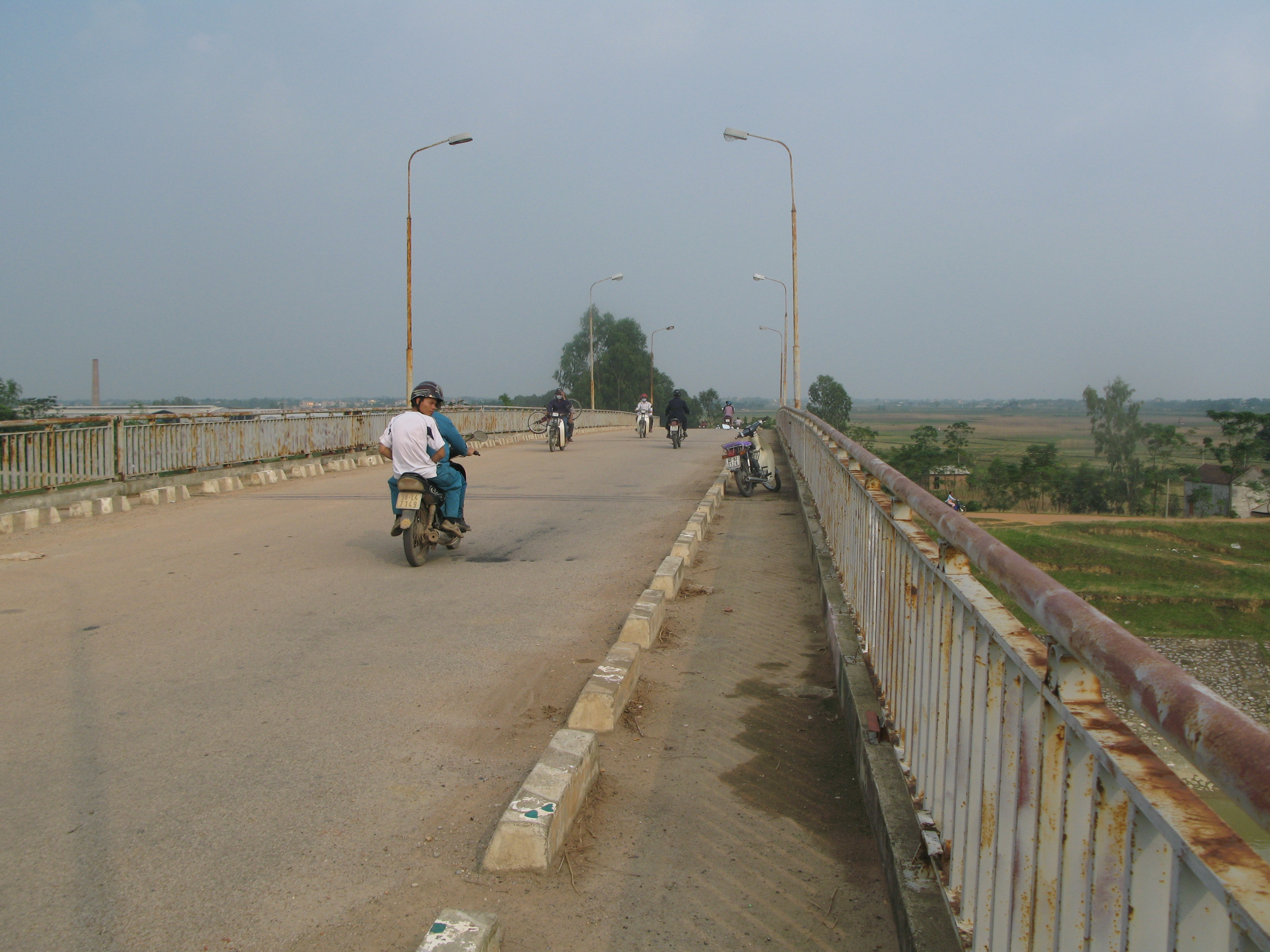 Thể loại:Cầu tại Hà Nội